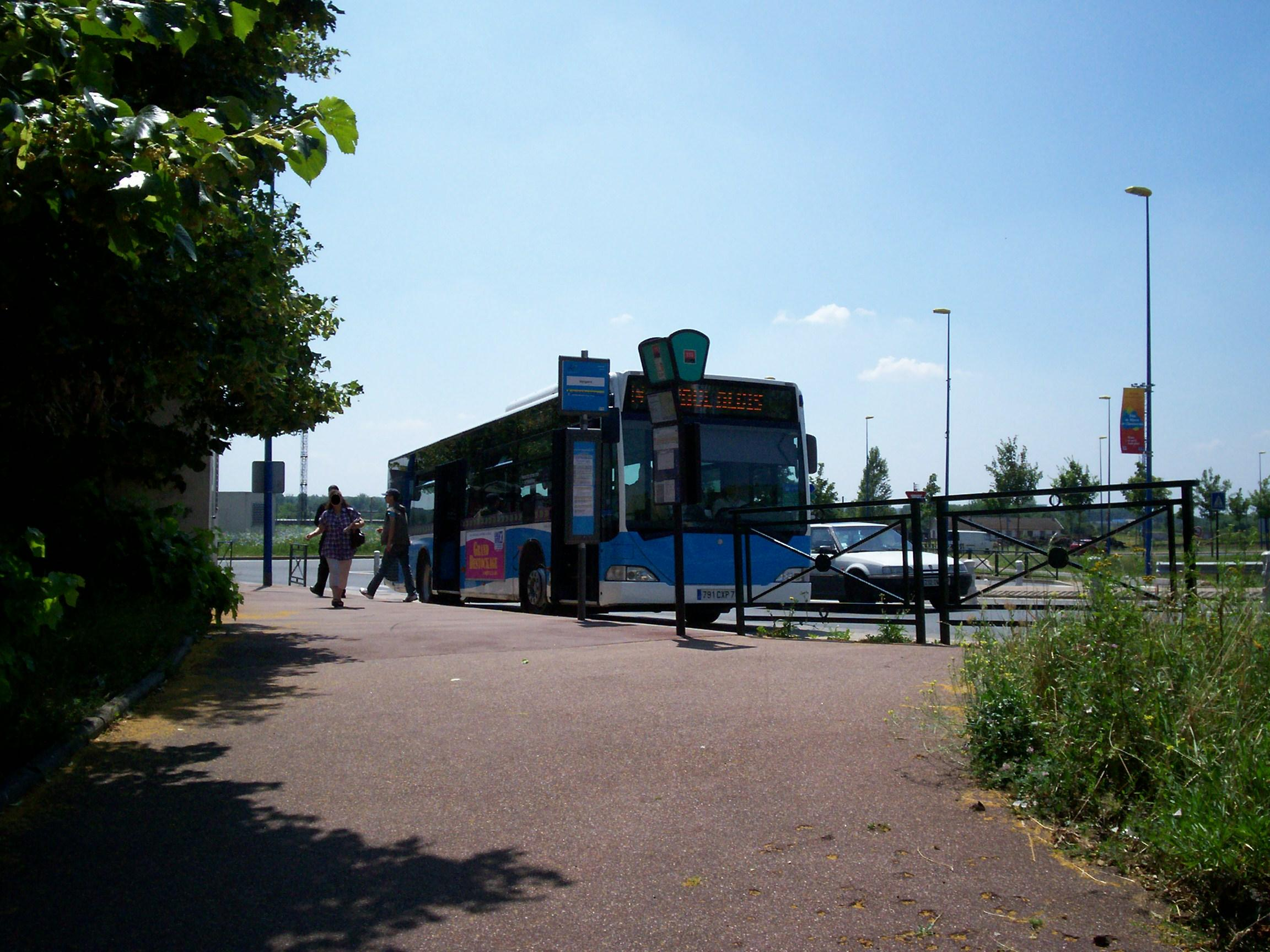 Bus Apolo7 C en direction de Paul Algis, à l'arrêt "Vergers"